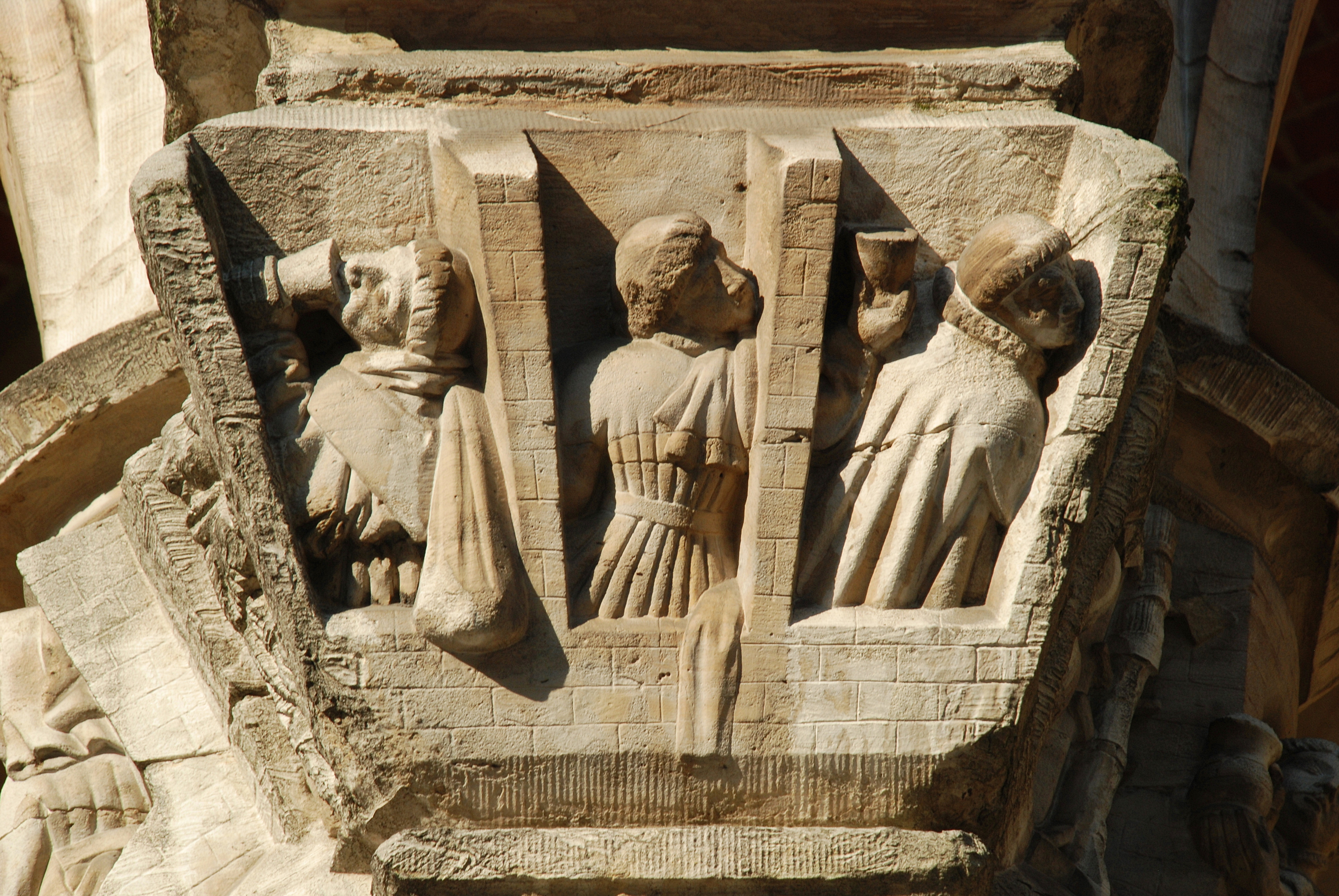 Belgique - Bruxelles - Grand-Place - Hôtel de ville - Cellier des Moines